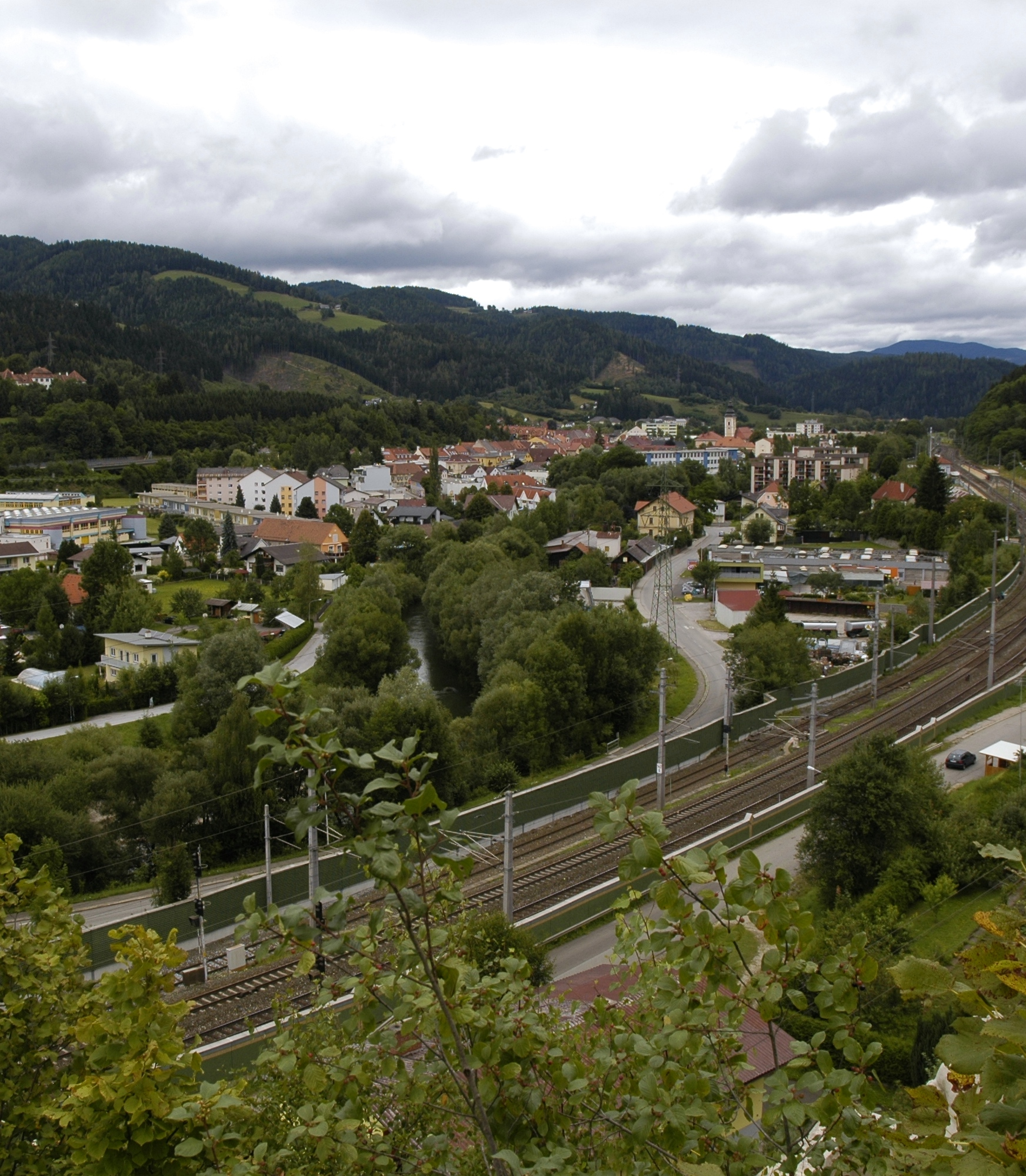 Heutige Ansicht von Kindberg vom Kalvarienberg